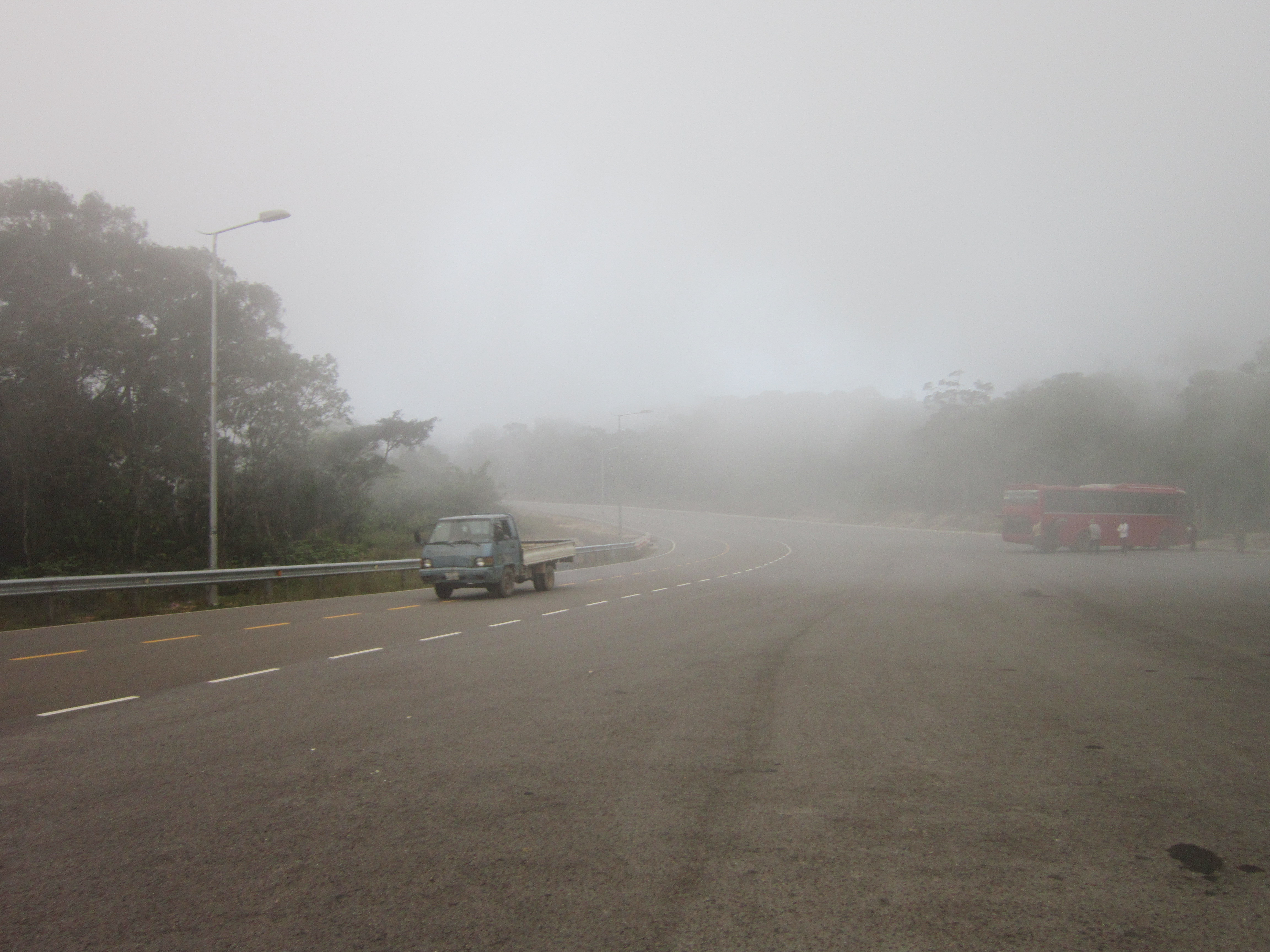 Đây là con đường nhựa rộng dẫn lên núi Tà Lơn thuộc Campuchia.